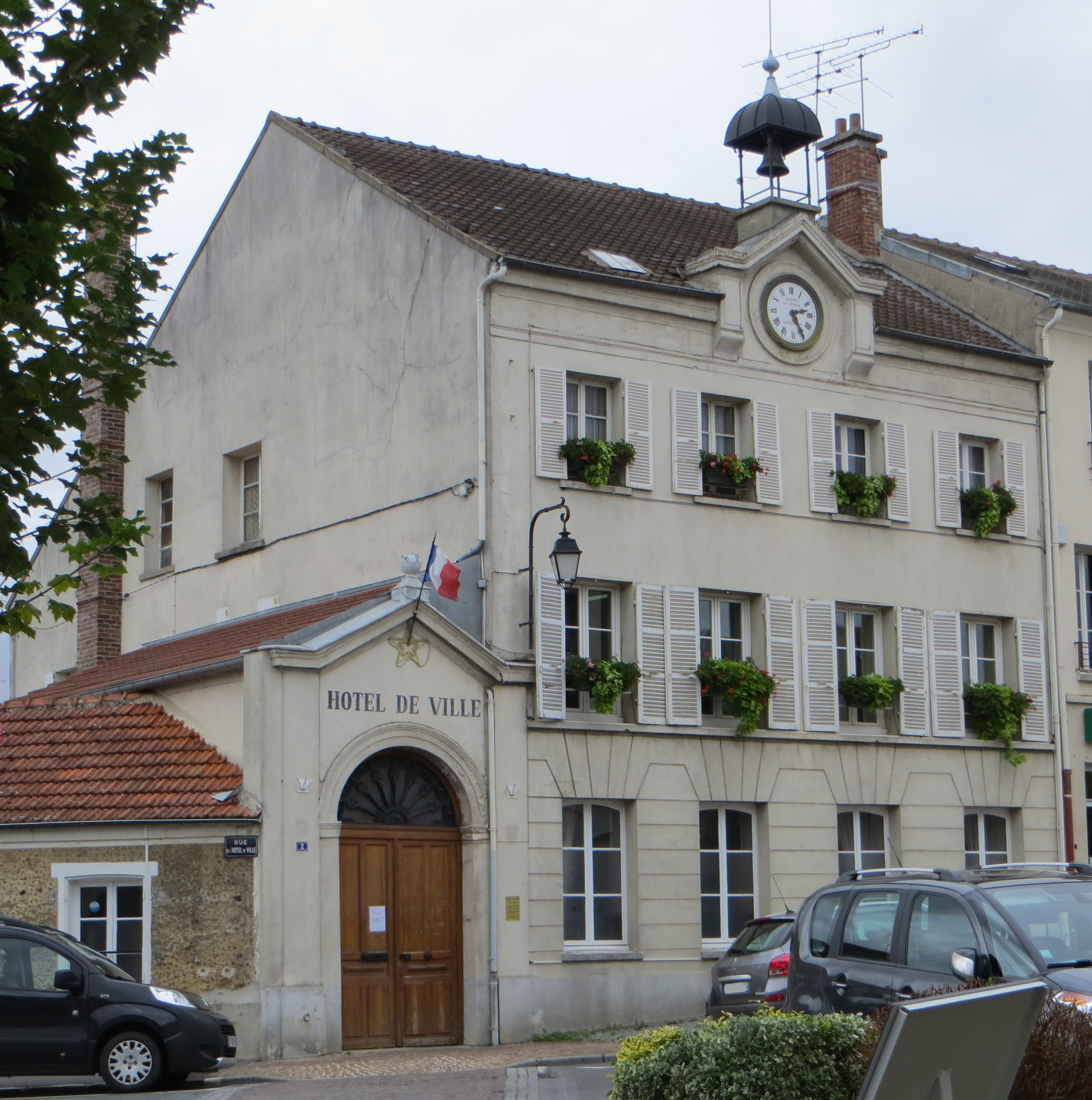 Mairie